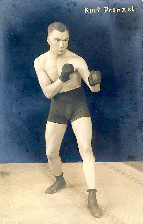 Foto-Ansichtskarte des Boxers Kurt Prenzel durch den Fotografen Alfred Grohs ...